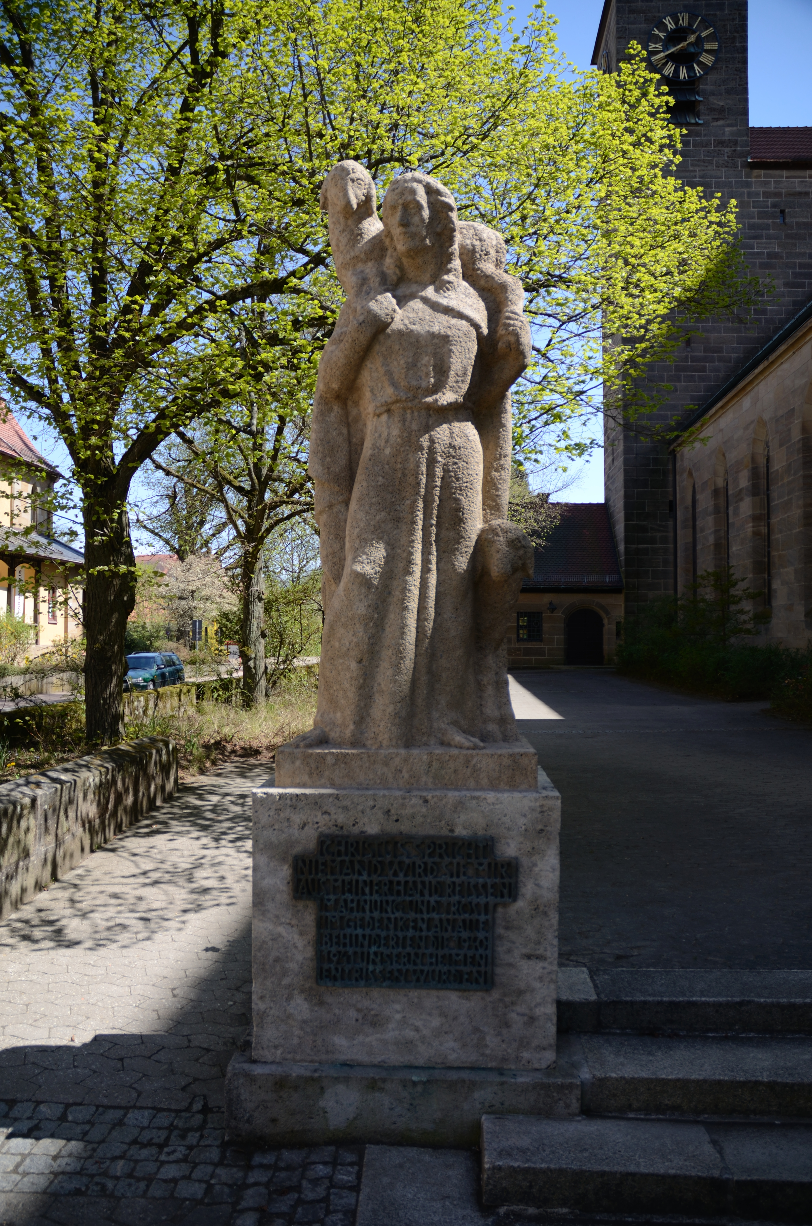 Statue "der gute Hirte" neben der St. Laurentius Kirche als Mahnmal für die Euthanasie in Neuendettelsau.